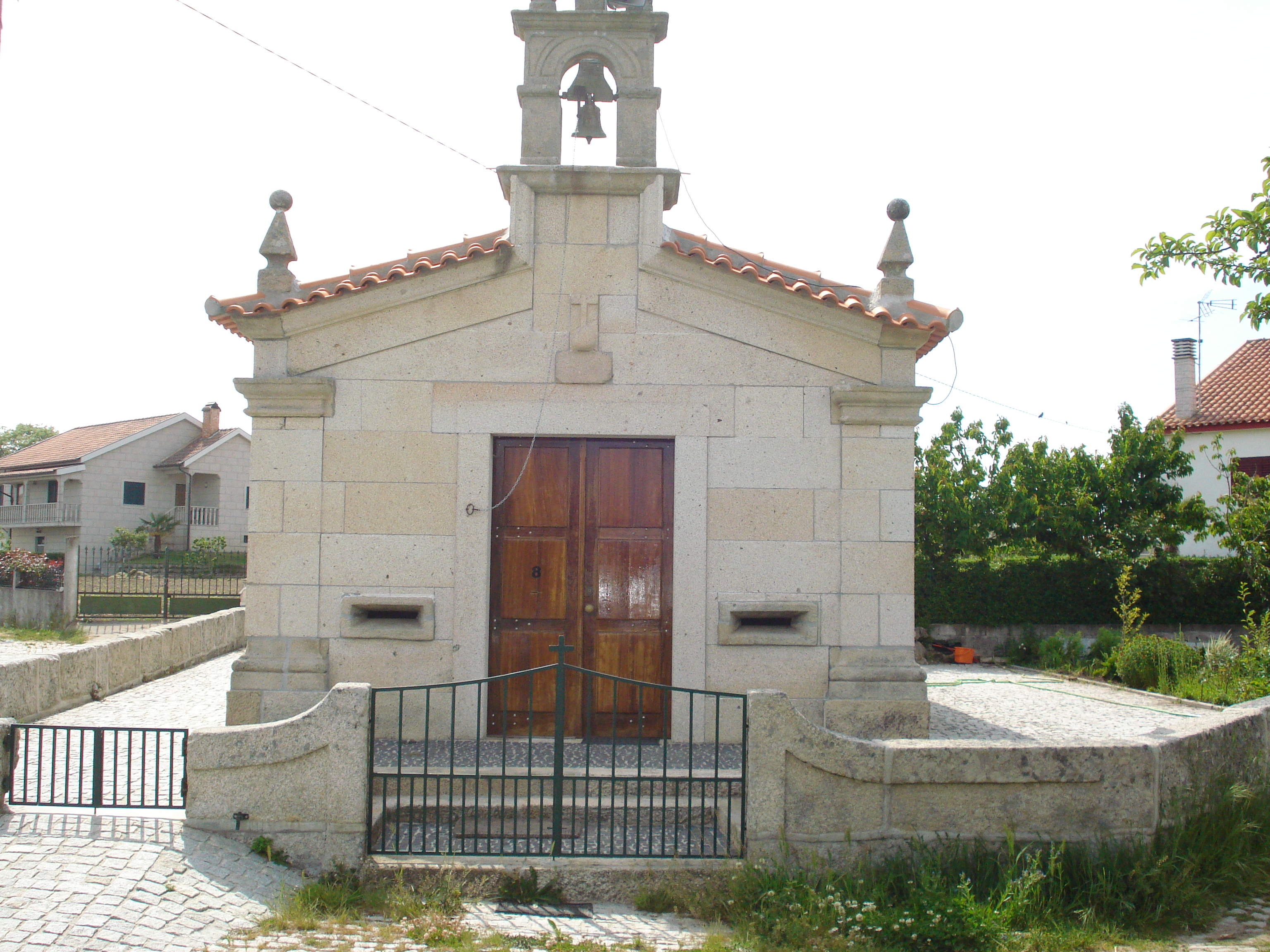 Pranhos-Capela de São João